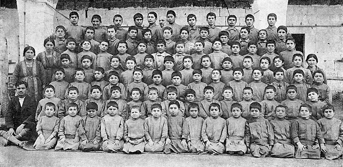 Missak Manouchian (au niveau de la croix) à l'orphelinat de Djunié (Syrie) en 1919.